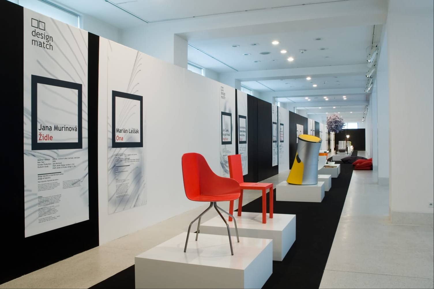 Výstava Design Match, přehlídka designu v Národní galerii v Praze, 2006